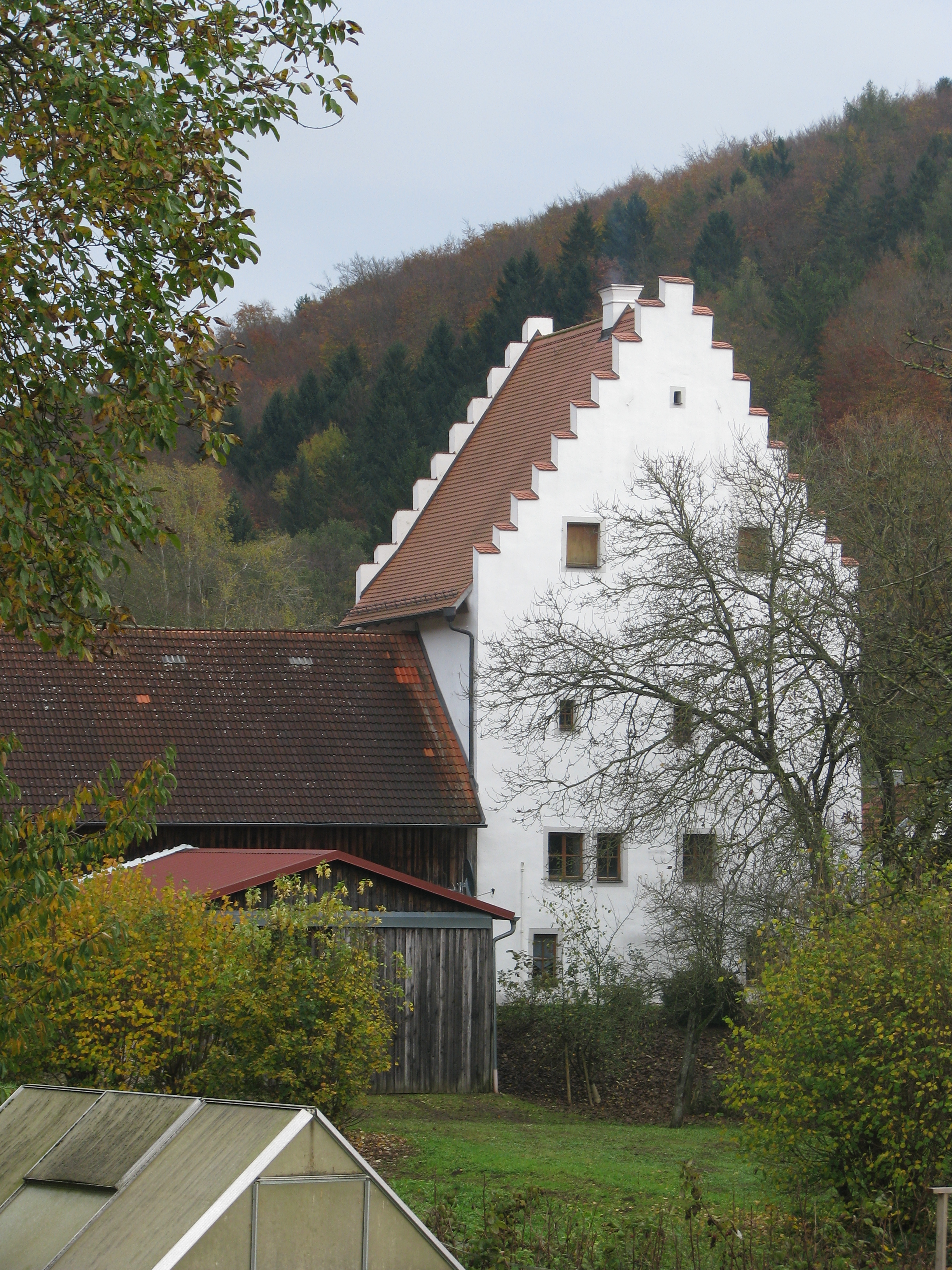 Oberrohrenstadt, Ortsteil der Gemeinde Berg bei Neumarkt in der Oberpfalz